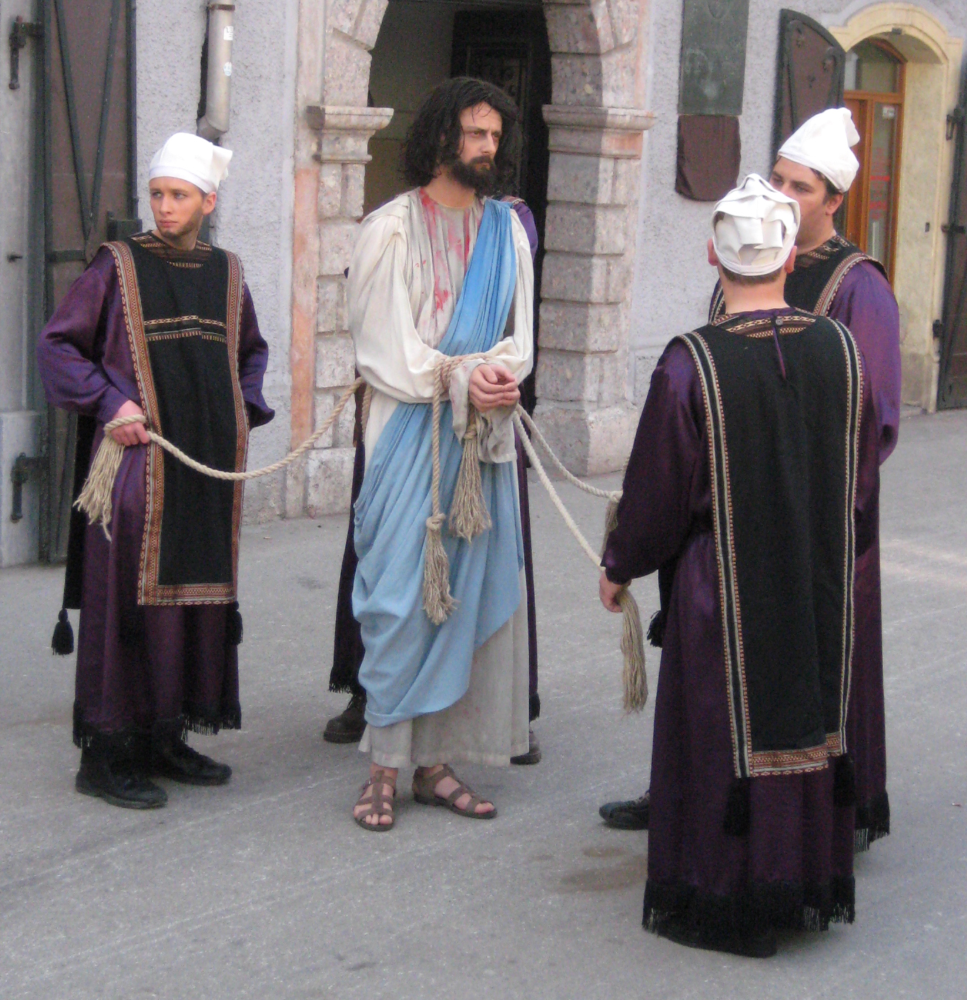 Škofjeloški pasijon (Processio Locopolitana), izvedba 2009 v Škofji Loki